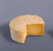 Queso de Peñamellera